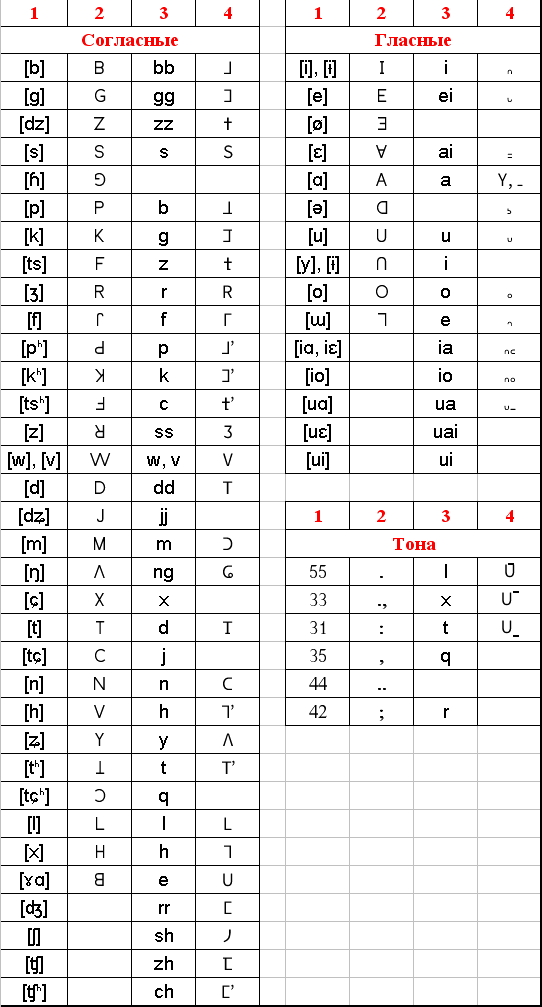 1 - транскрипция, 2 - алфавит Фрейзера, 3 - латиница, 4 - письмо Полларда